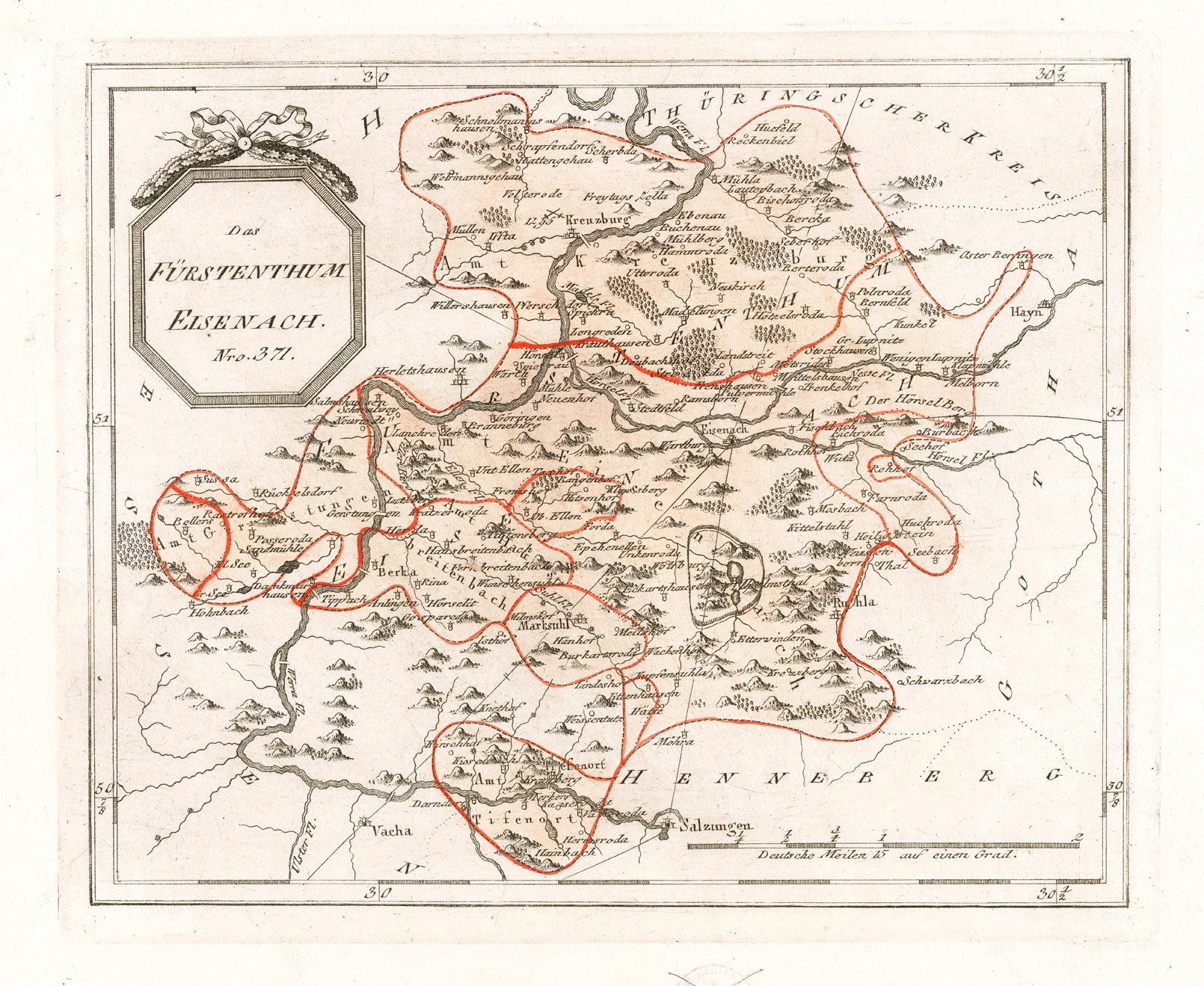 Das Fürstenthum Eisenach. Nro. 371. Kupferstich, 27 × 22 cm